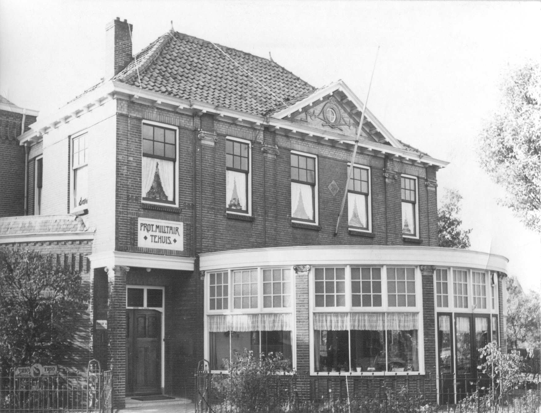 Het Protestants Militair Tehuis aan de Borneostraat 2; november 1966